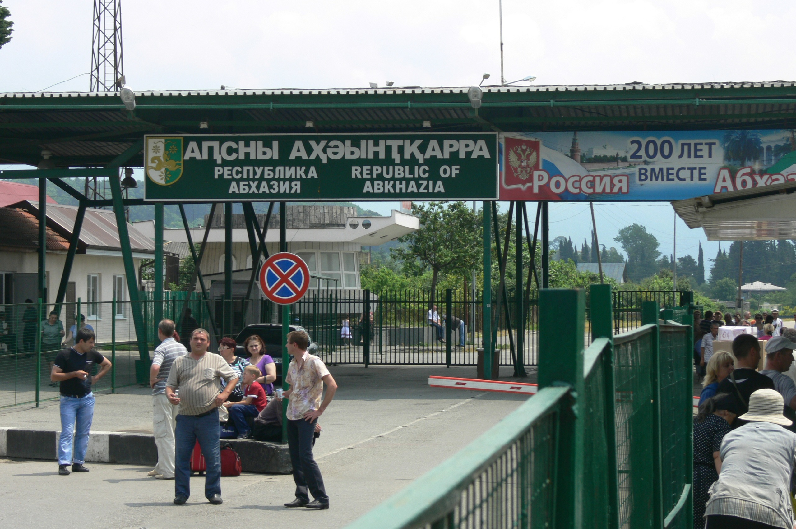 Российско-абхазская граница